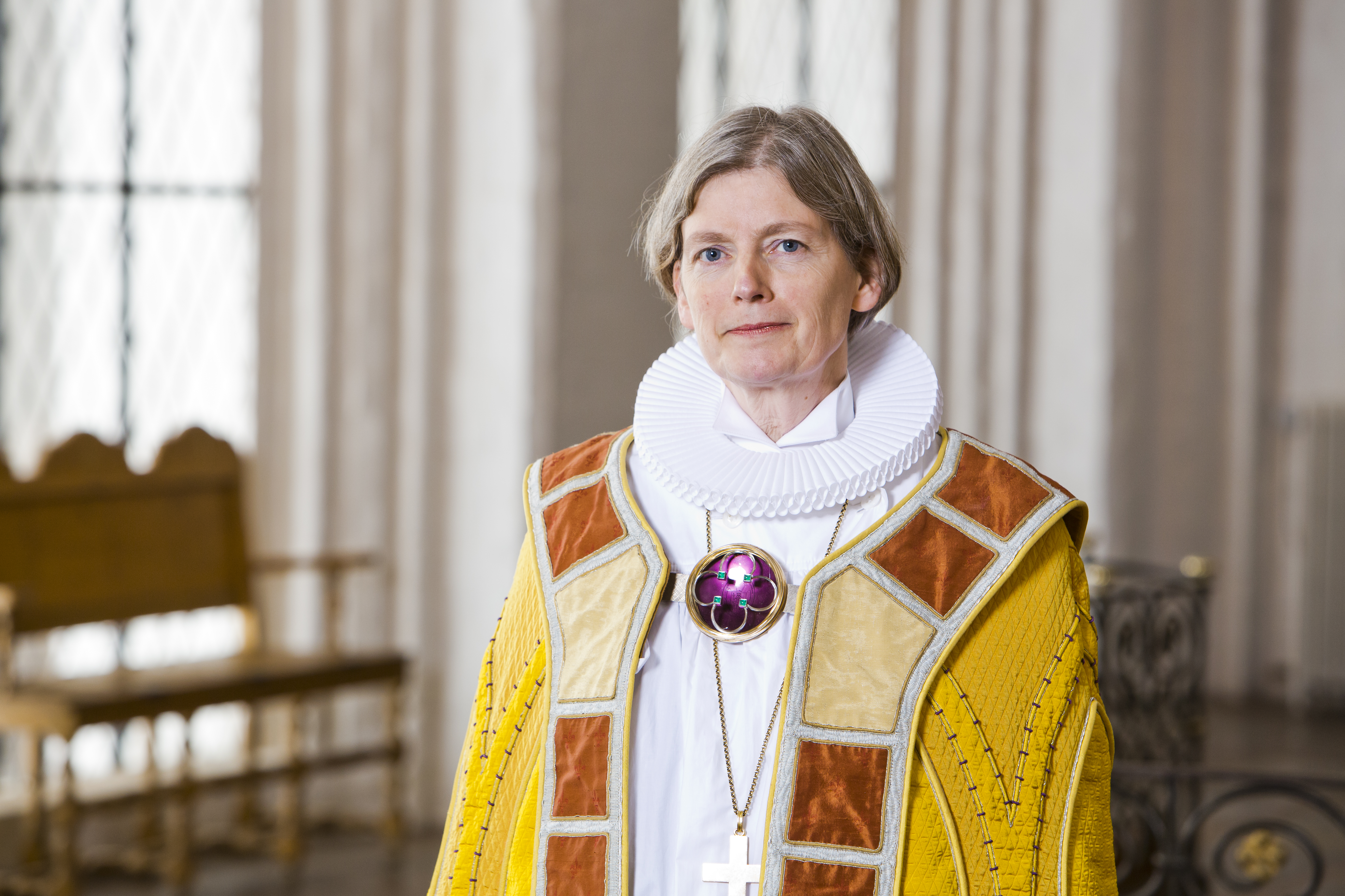 Biskop Tine Lindhardt fra Fyens Stift.